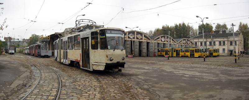 Трамвайный парк на улице Городоцкой.